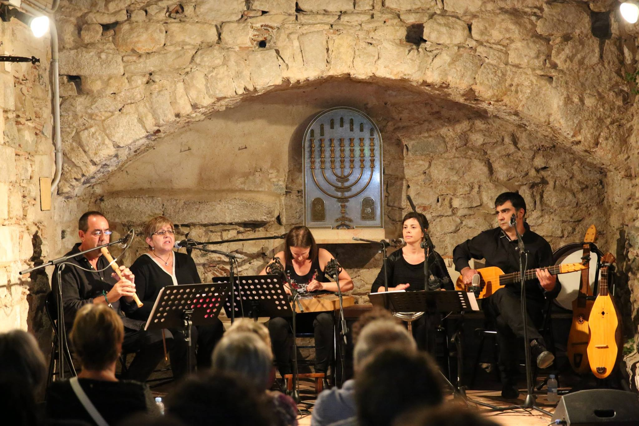 Maladanza en la juderia de Girona